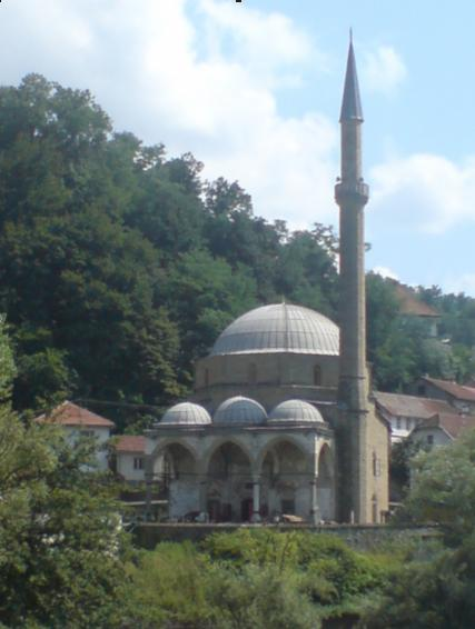 Slika Jusuf-pašine džamije